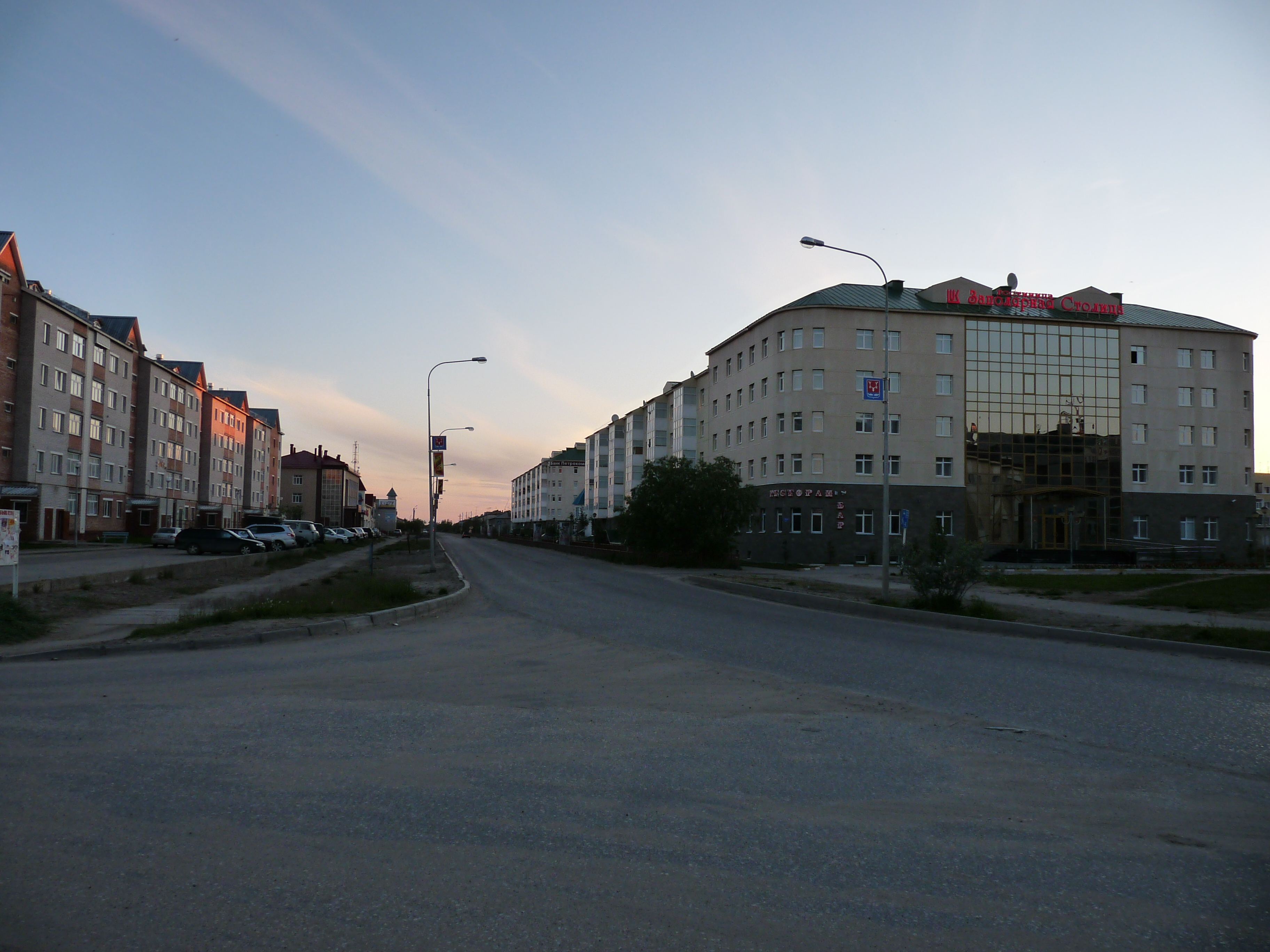 Улица ленина, гостиница заполярная столица